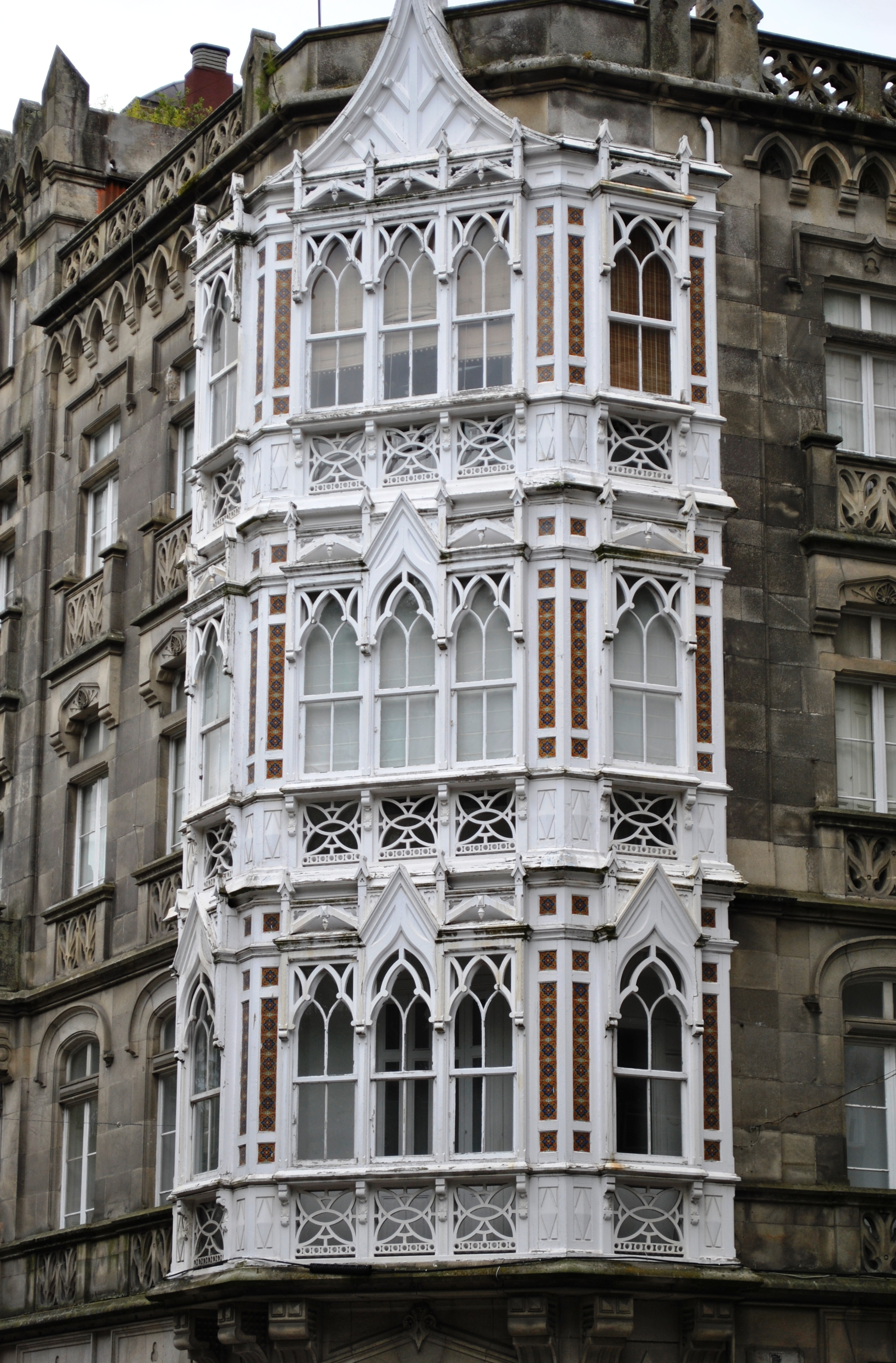 Vexa o título e as categorías.